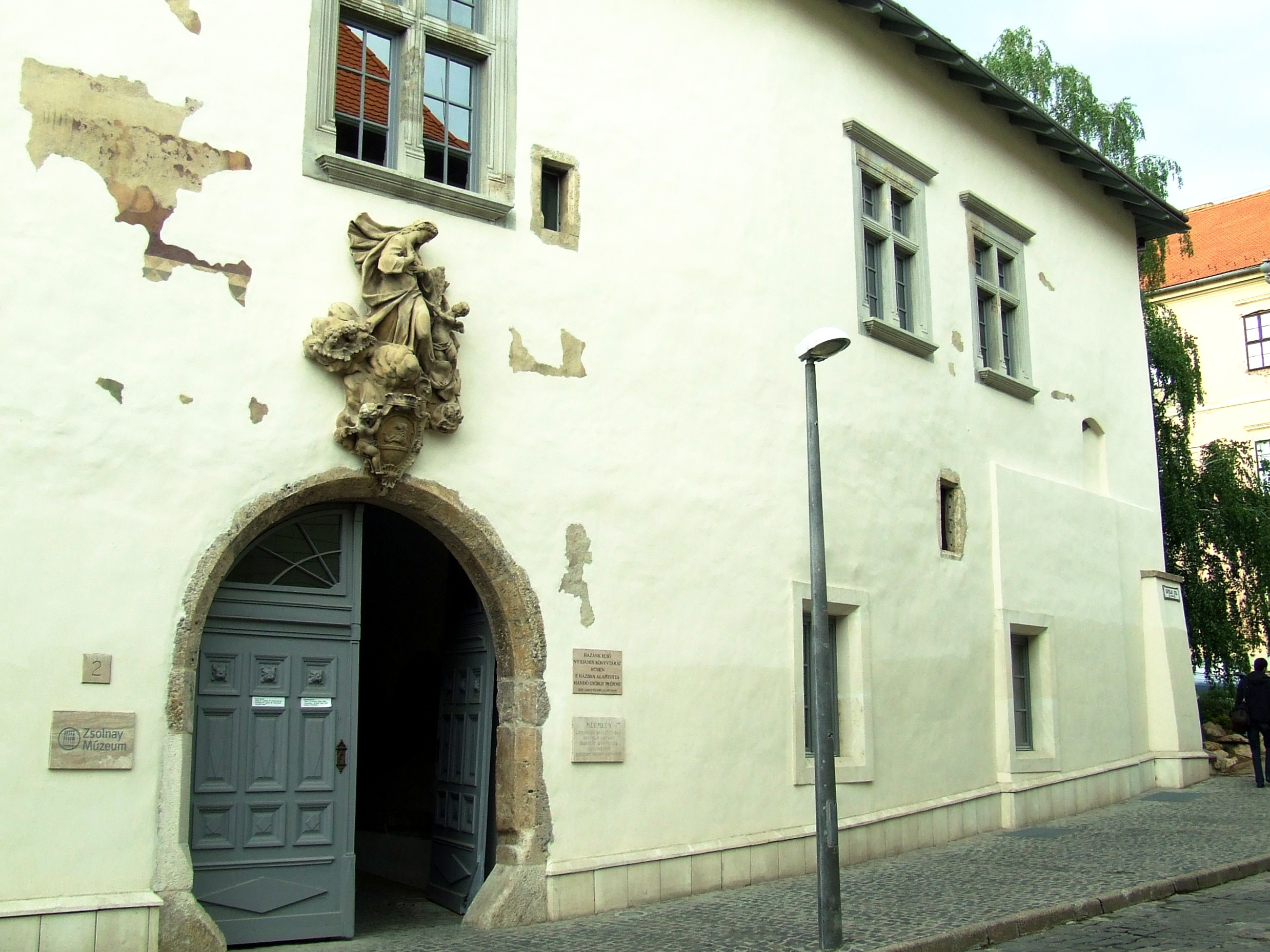 A pécsi Zsolnay Múzeum. A műemlék épületről az első írásos feljegyzés 1324-ből való. Többször átépítették. Homlokzatán reneszánsz freskómaradványok láthatók. 1477-ben ebben az épületben alapította Magyarország első nyilvános könyvtárát Handó György prépost